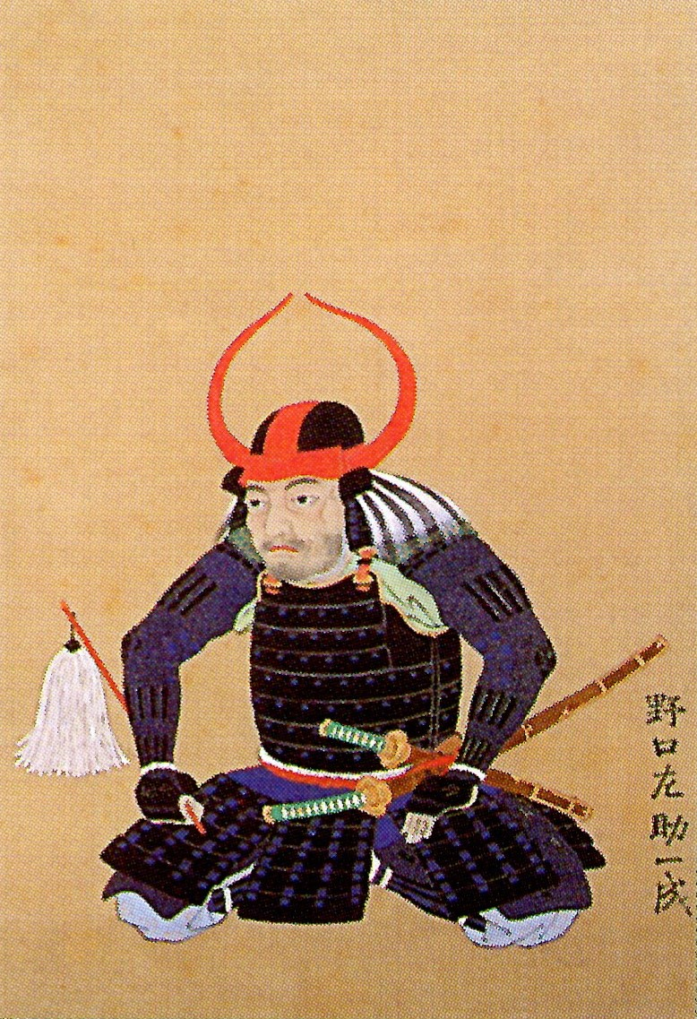 野口一成の肖像。